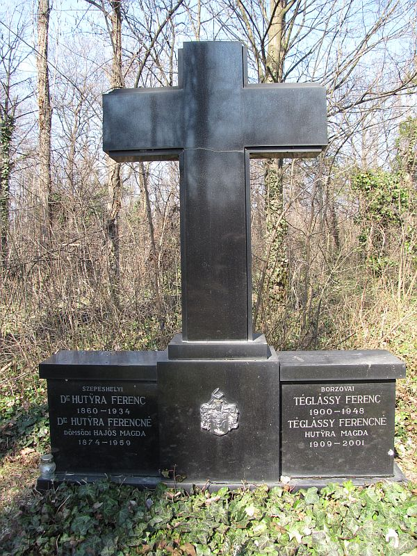 Szepeshelyi Hutÿra Ferenc (Szepeshely-Zsibra, 1860. szeptember 6. – Budapest, 1934. december 21.) állatorvos, orvos, patológus sírja Budapesten. Kerepesi temető: 47-1-80.